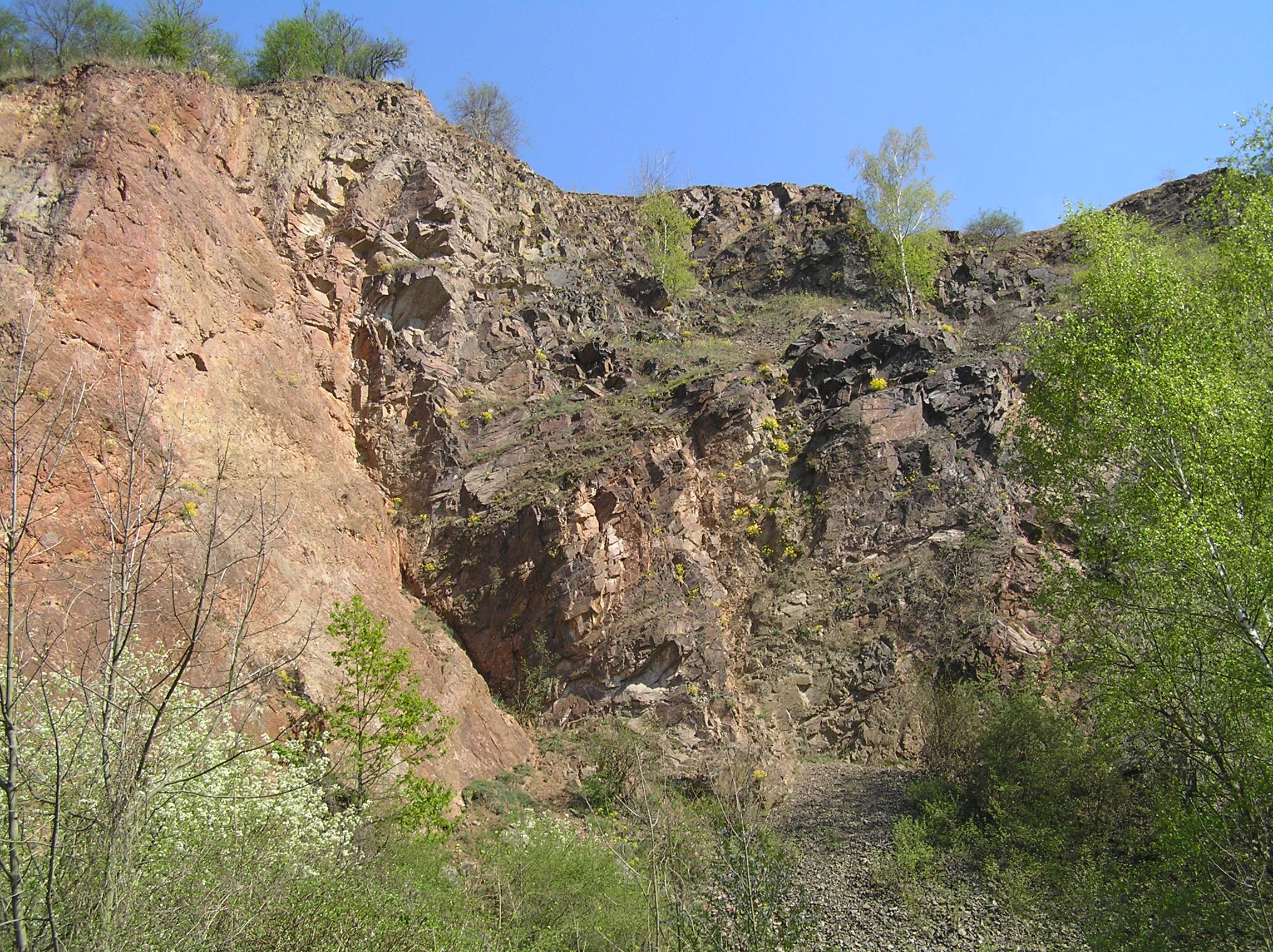 PP Zámky u Čimic a Bohnic v Praze